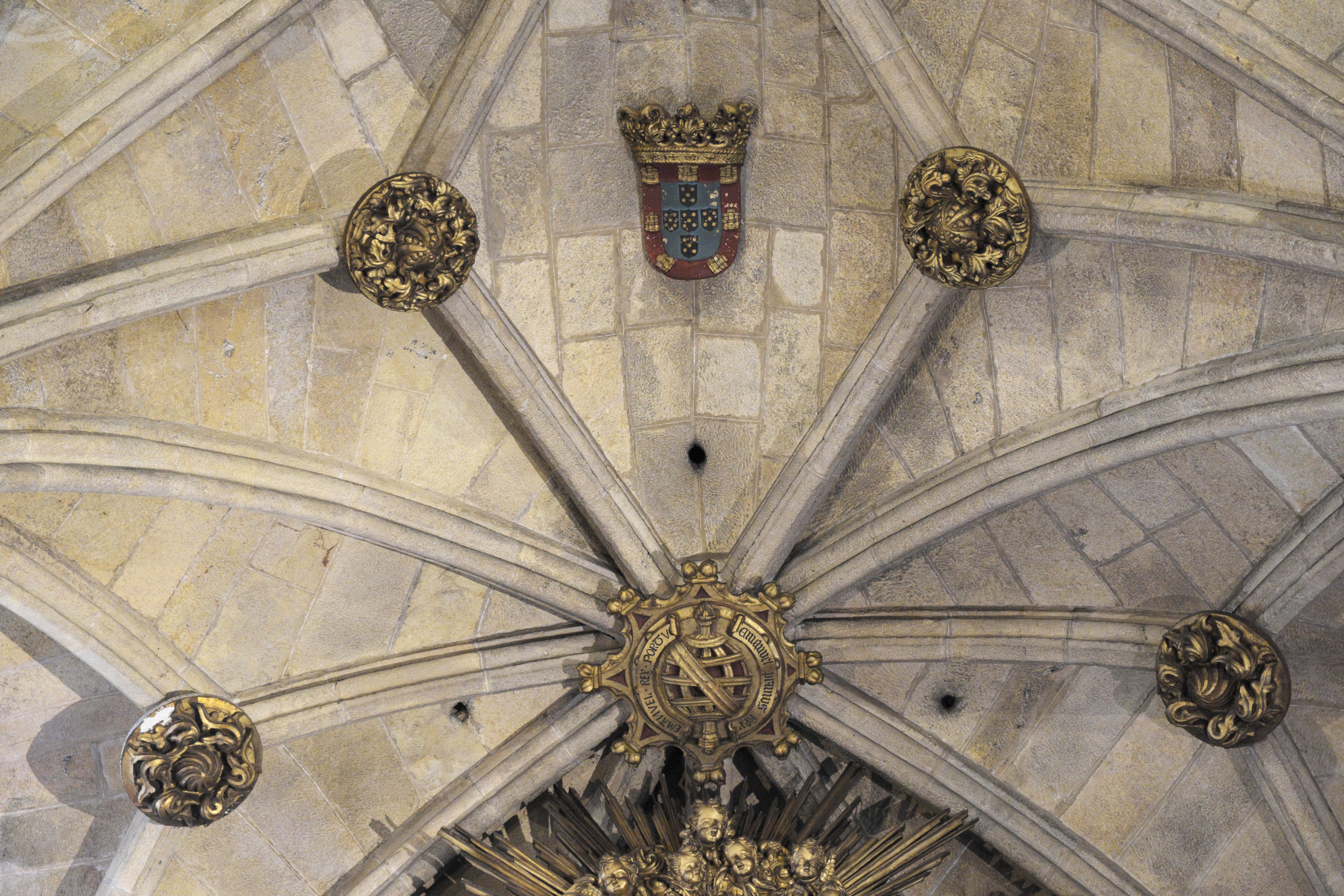 Ehemalige Augustinerchorherrenstiftskirche Santa Cruz in Coimbra (Portugal), Gewölbe, Schlusssteine mit Wappen